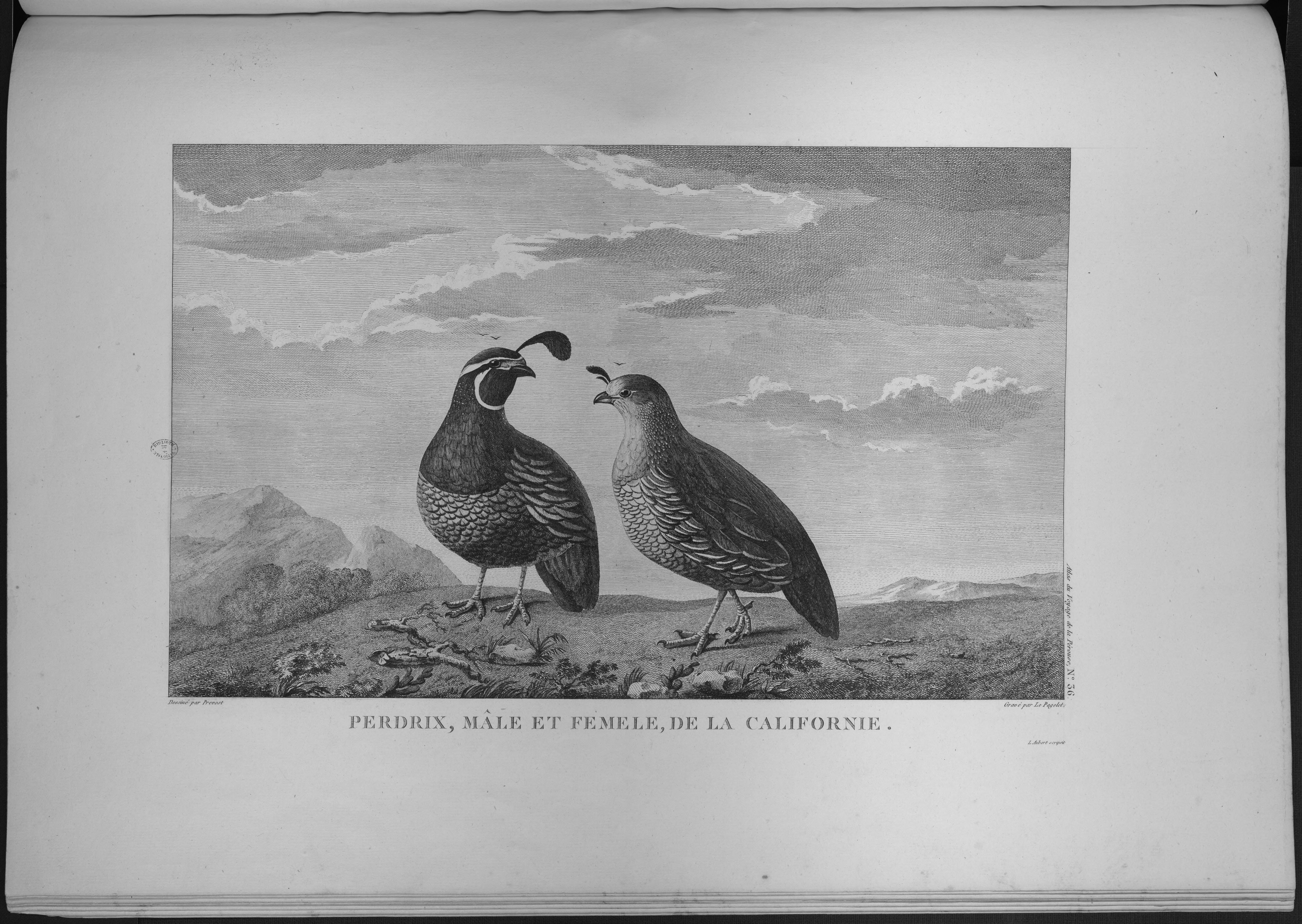 Atlas du voyage de La Pérouse